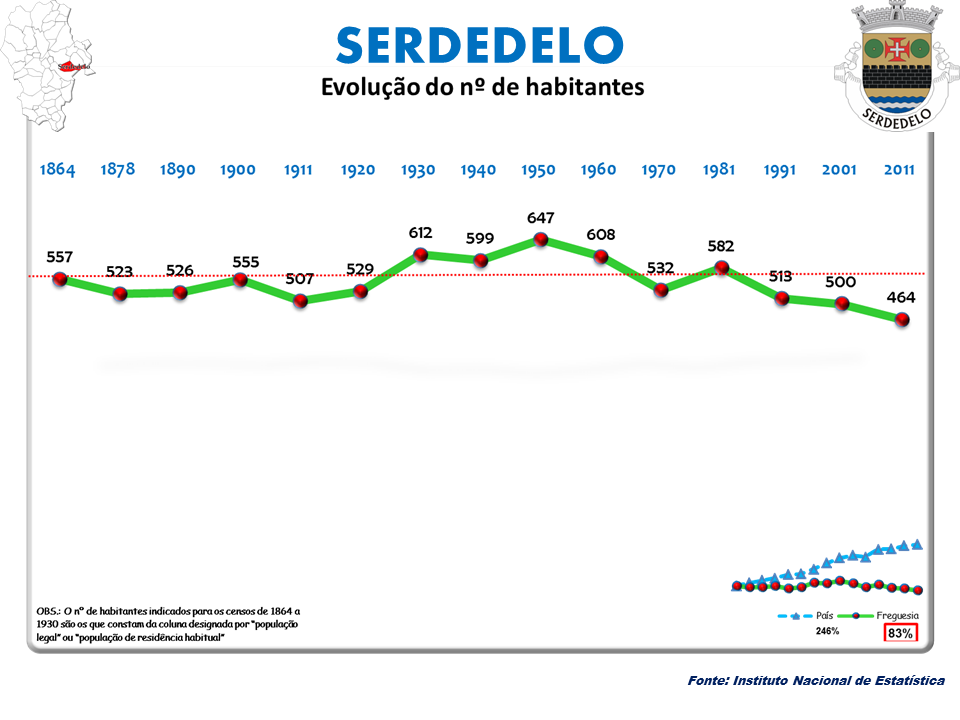 Censos 1864/2011